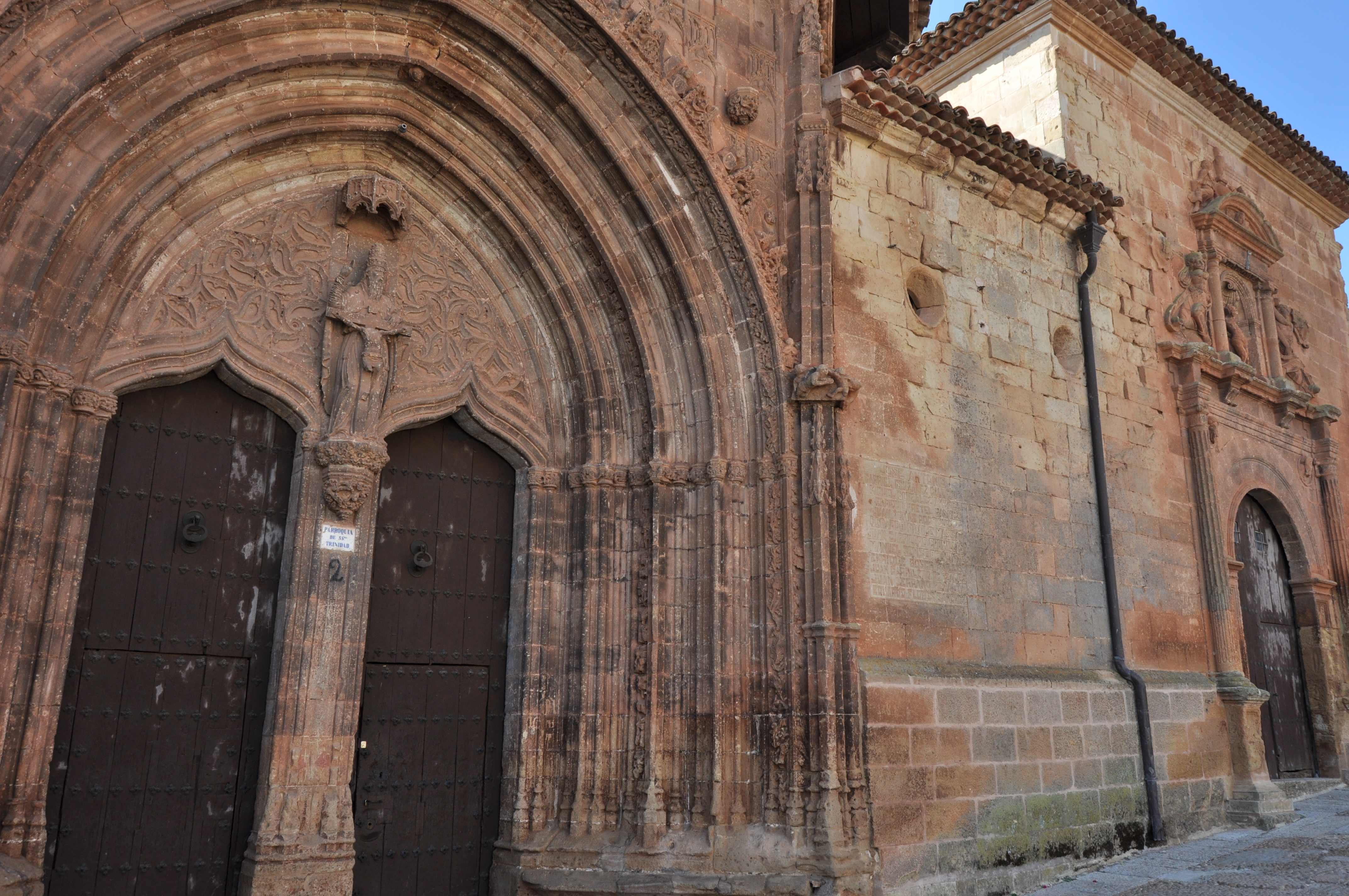 Alcaraz - 018